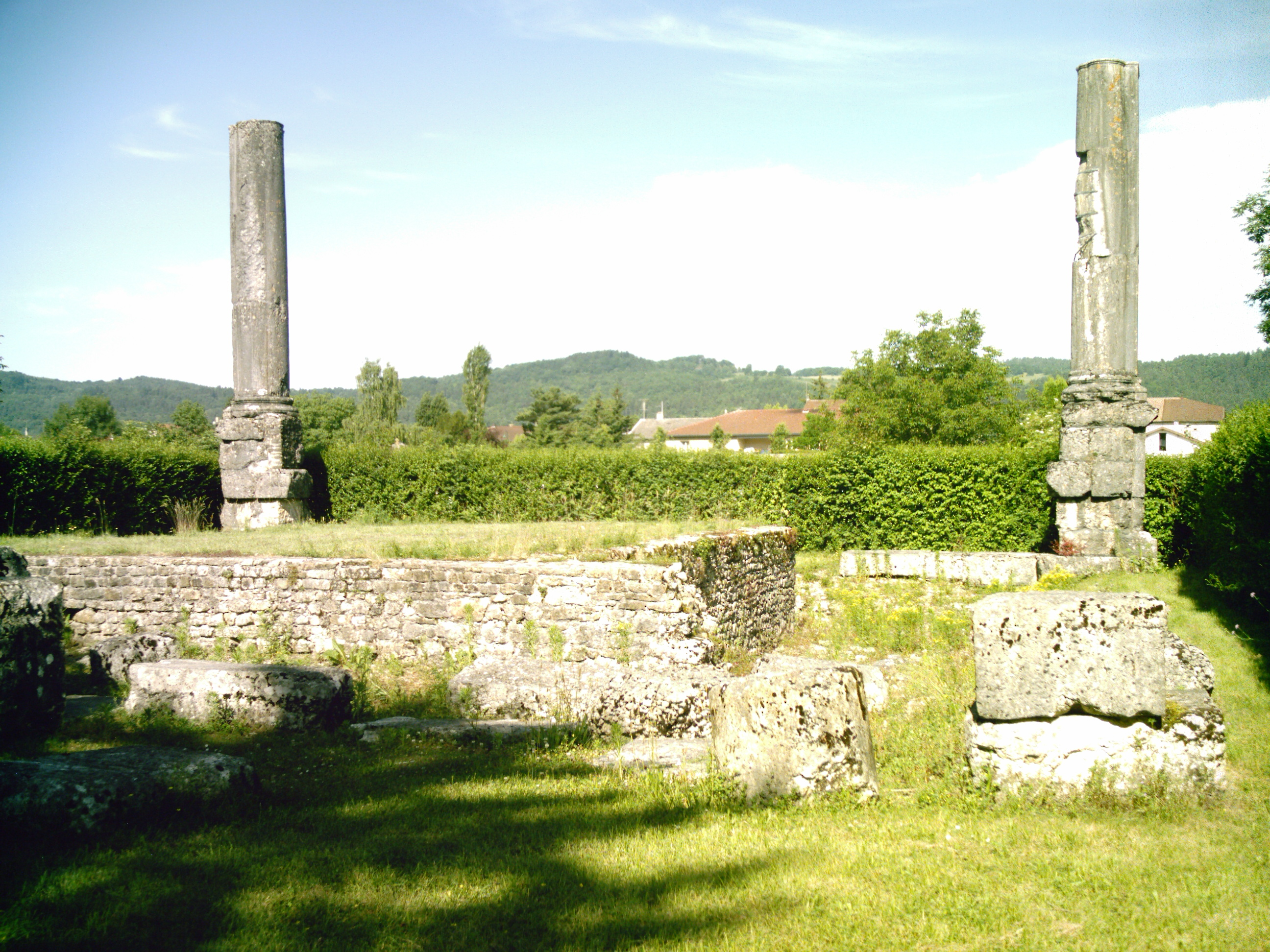 Les ruines du temple gallo-romain d'Izernore (Ain, FRANCE)